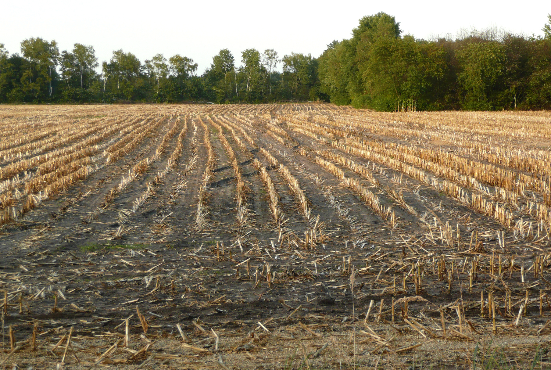 abgeerntetes Maisfeld beim Ramlingen, DE